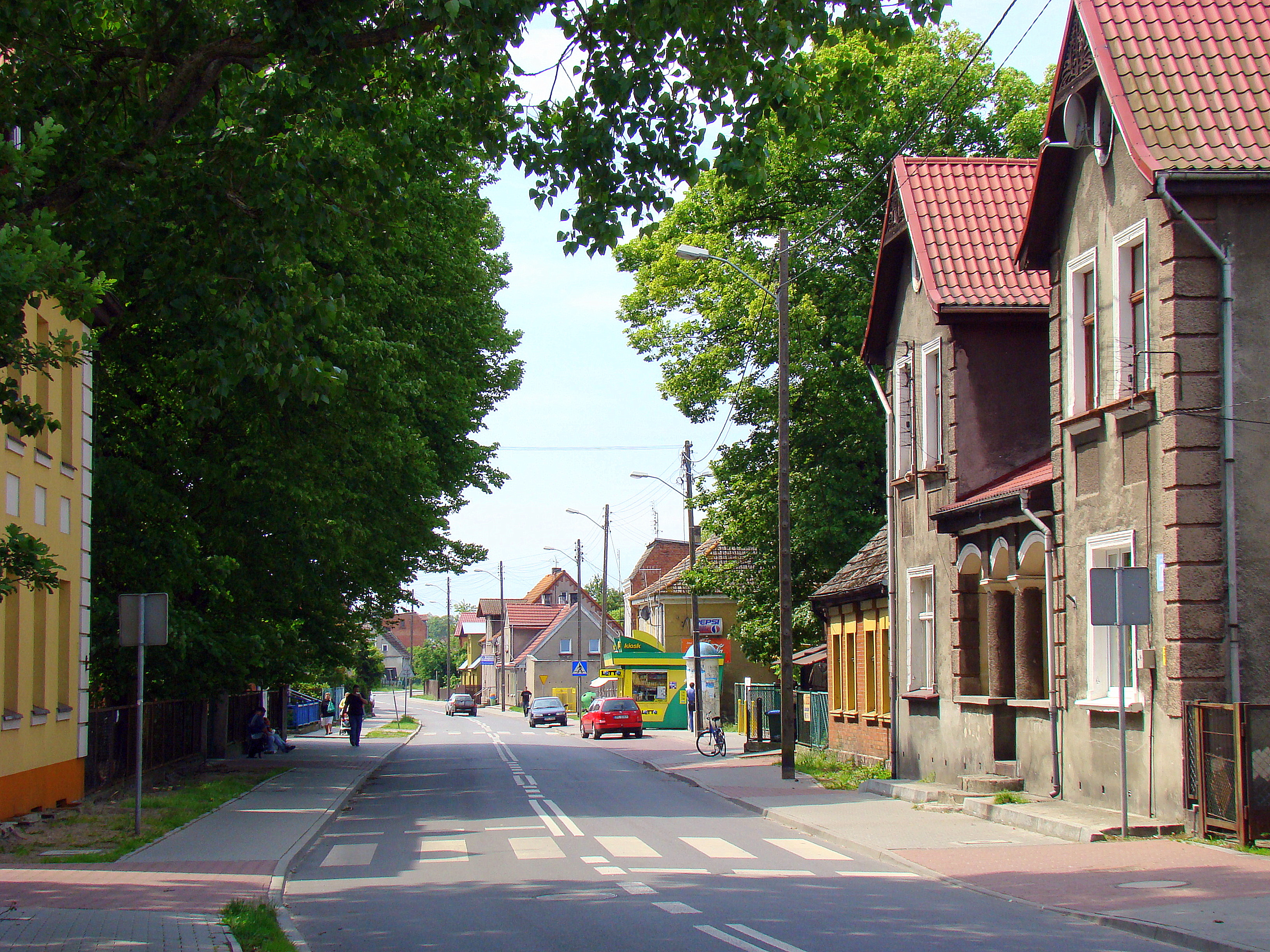 Trzebież, ul. WOP, (Gmina Police, Powiat policki, Województwo zachodniopomorskie), Polska